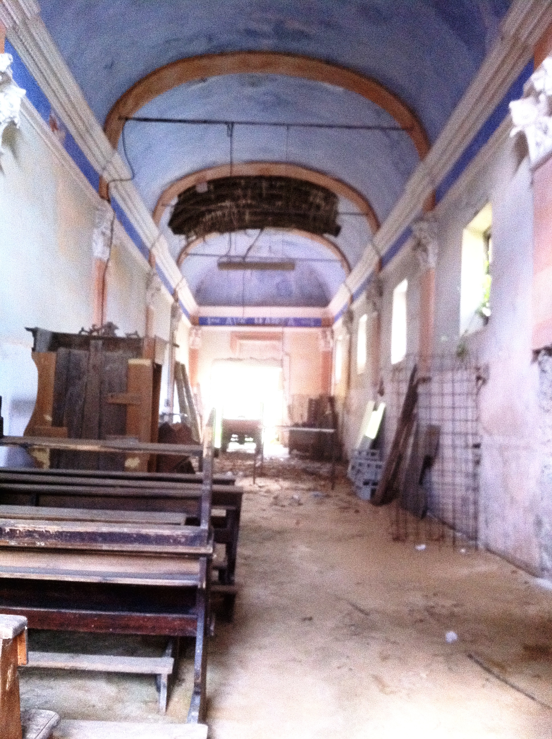 Oratorio di San Michele di Montagna di Quiliano (Italy)